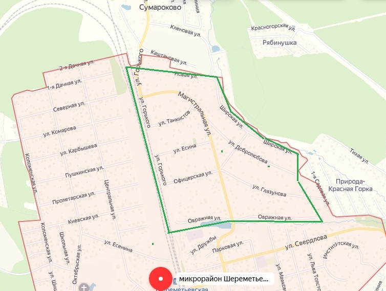 Дачный посёлок был образован вскоре после окончания Великой Отечественной Войны в соответствии с Постановлением СНК СССР от 21 июня 1945 г. N 1466 для «улучшения жилищных условий» заслуженным генералам и офицерам Красной Армии